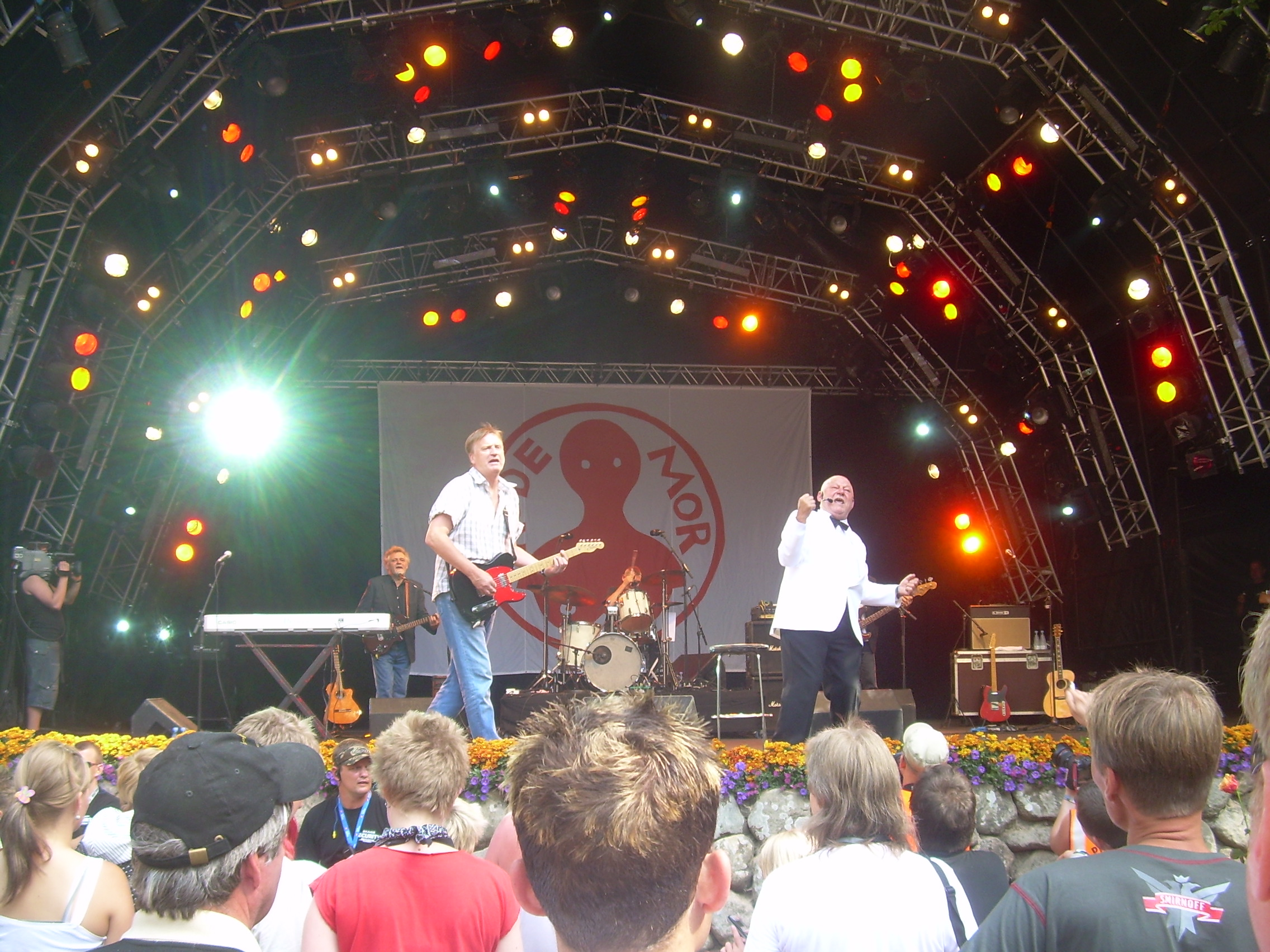 Danish band Røde Mor in concert at Skanderborg Festival 2007, Denmark